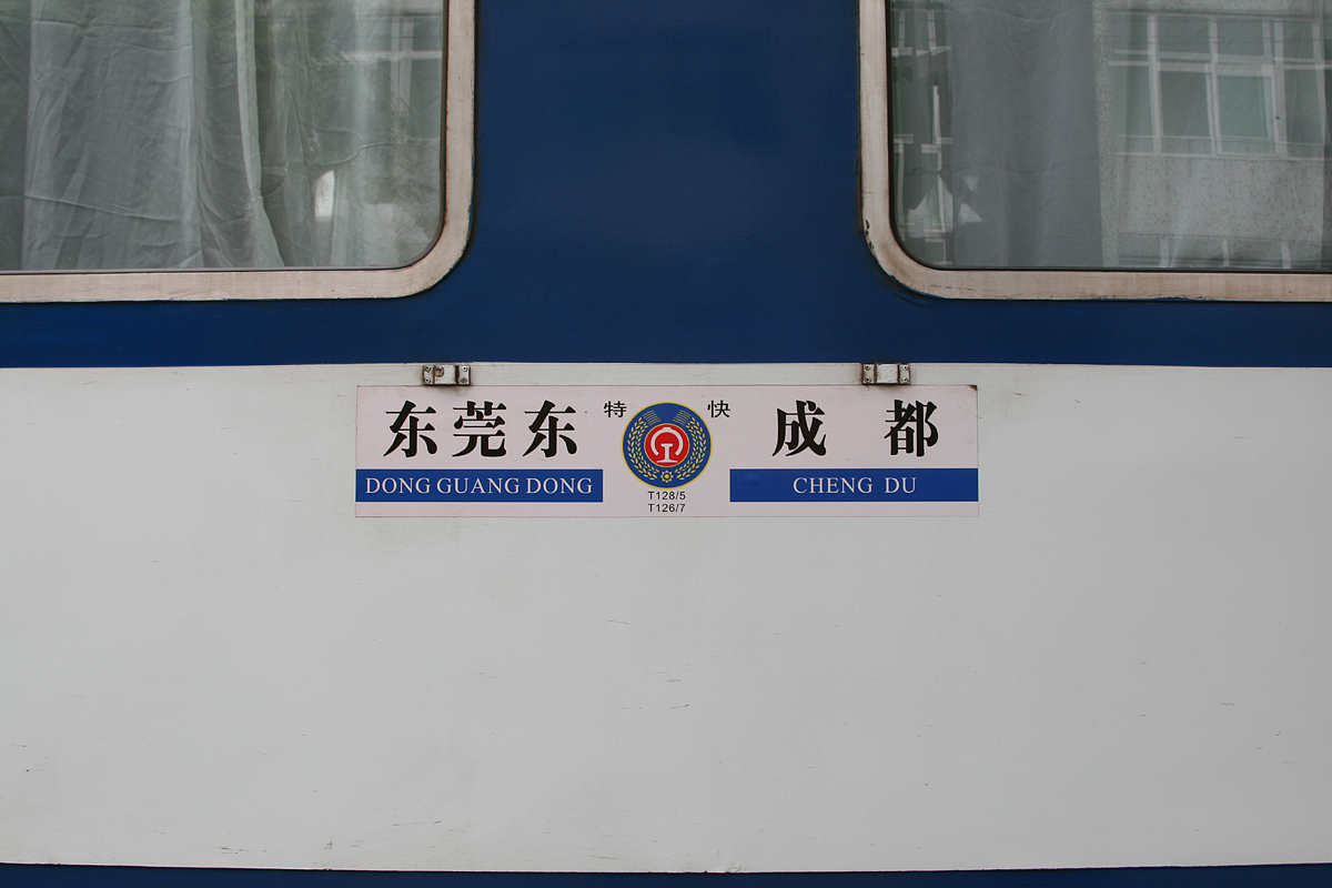 东莞东-成都列车水牌。